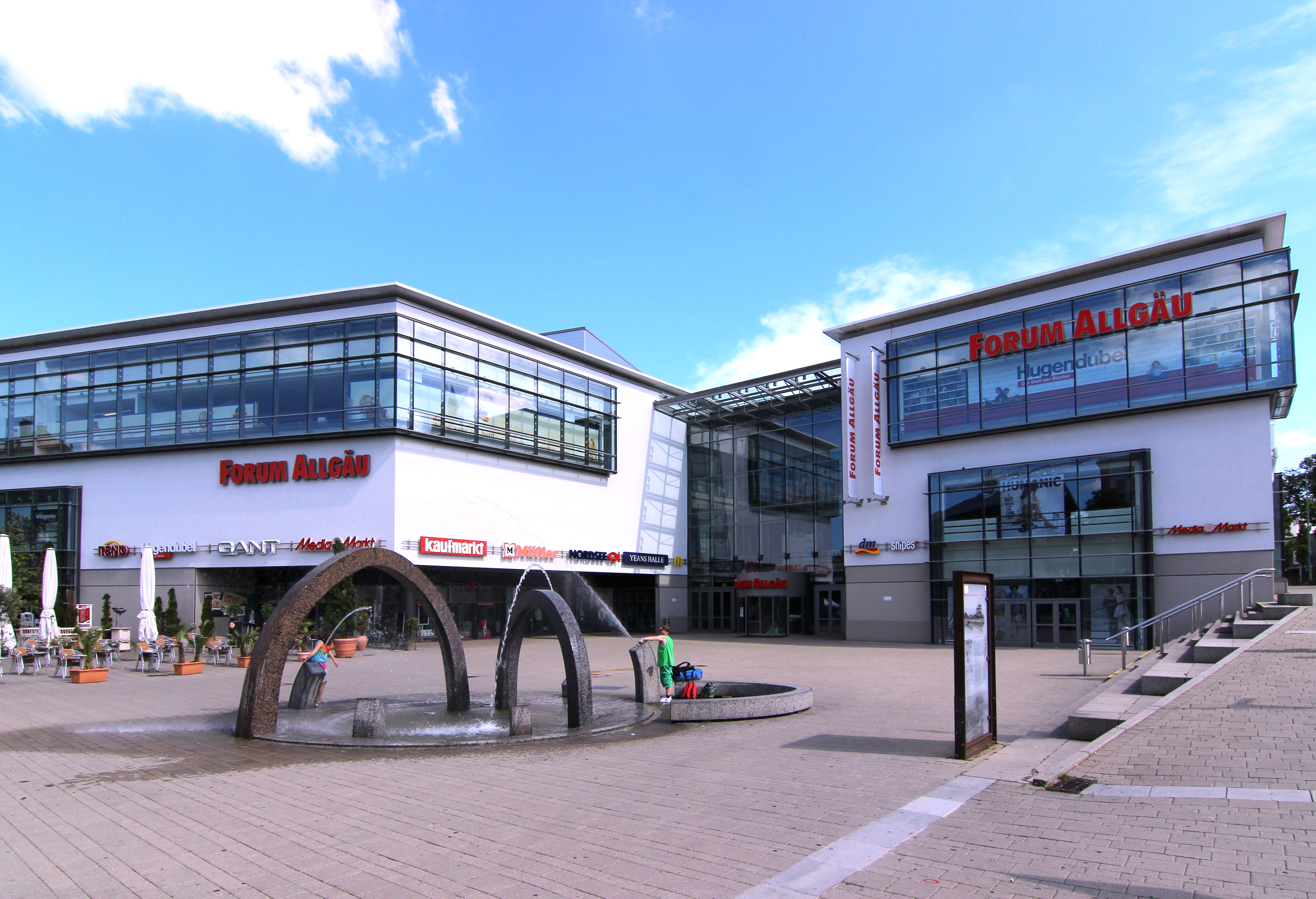 Nordseite, Forum Allgäu, Kempten